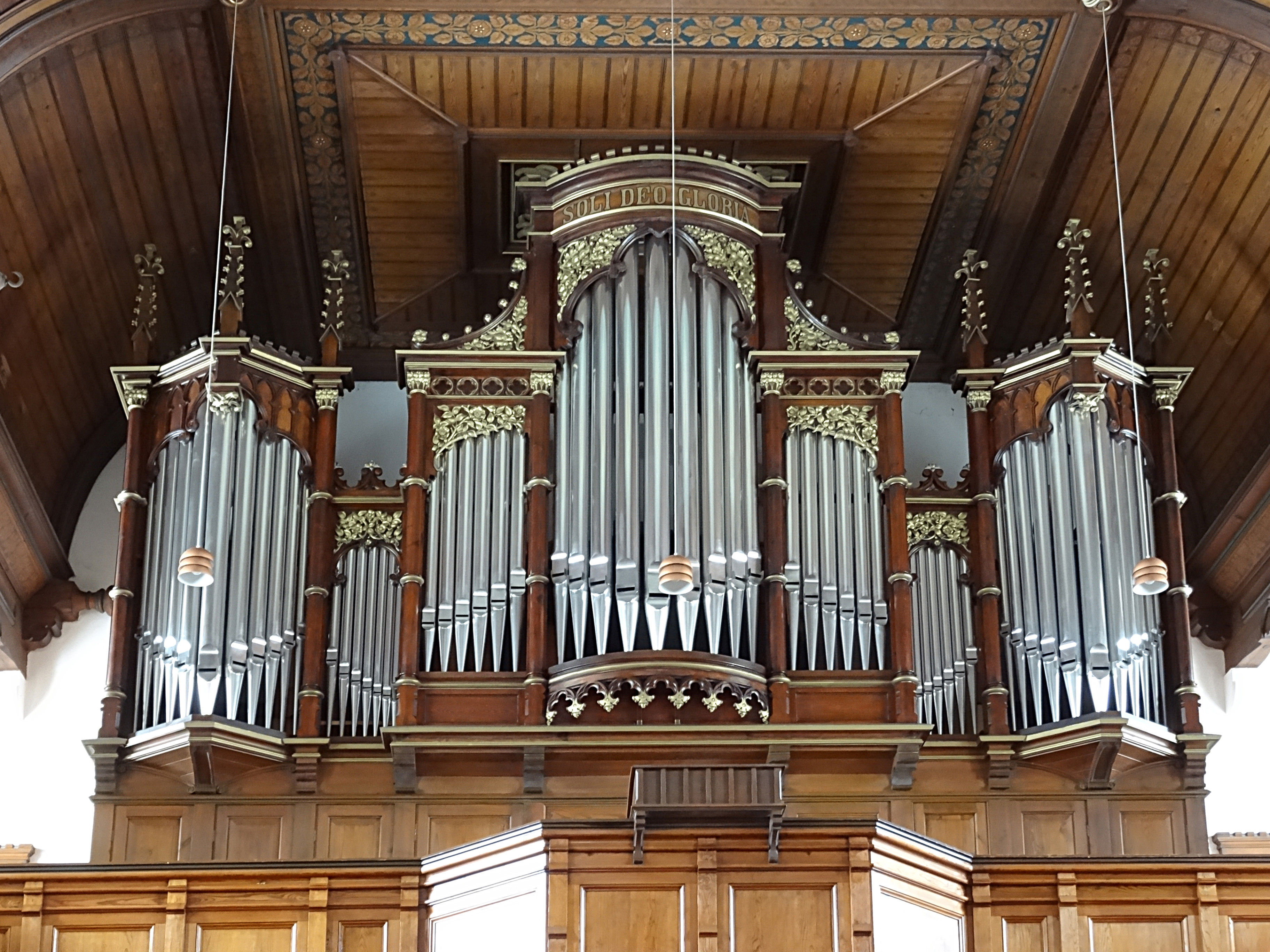 Schuster-Orgel (II/P 25, 1901) in der Dorfkirche Hörnitz